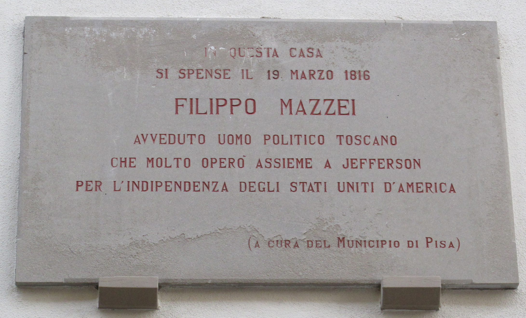 Pisa, targa filippo mazzei